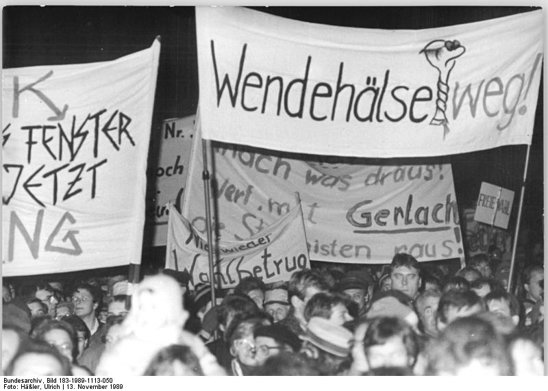 Dresden, Montagsdemonstration ADN-ZB Häßler 13.11.89 Dresden: Demonstration Zehntausende demonstrierten im Stadtzentrum für eine radikale Wende und die Neufassung des Paragraphen 1 der Verfassung der DDR.